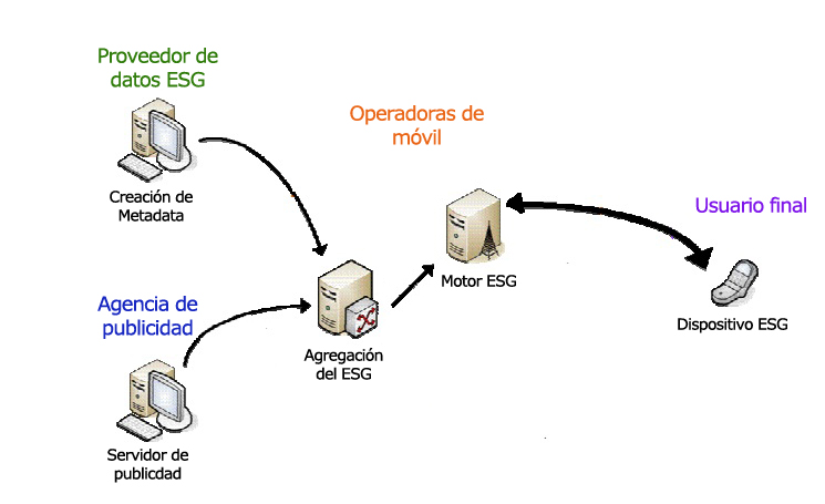 Arquitectura de la red ESG